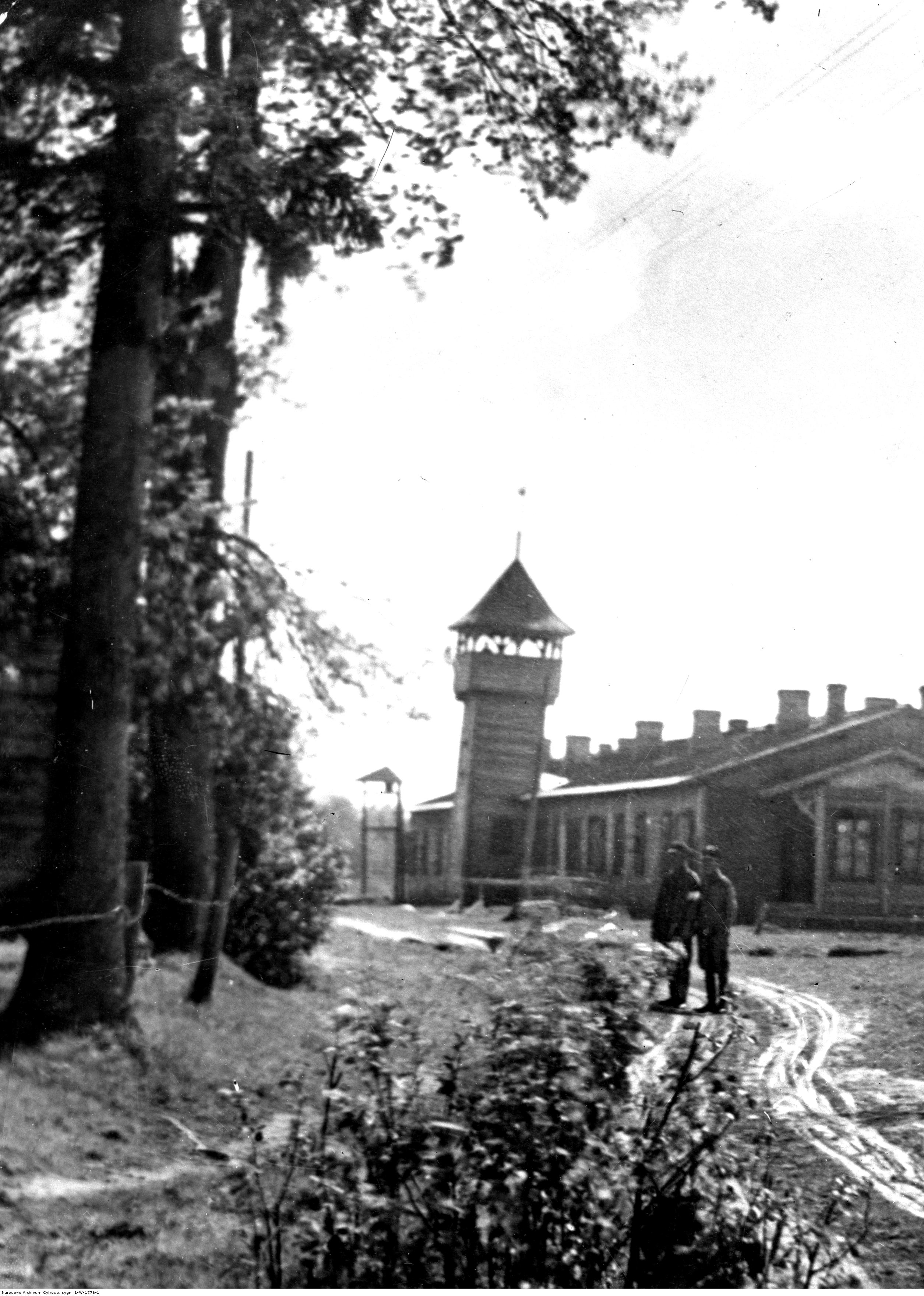 Koszary w Ćwiecinie. Koncern Ilustrowany Kurier Codzienny - Archiwum Ilustracji. Sygnatura: 1-W-1776-1